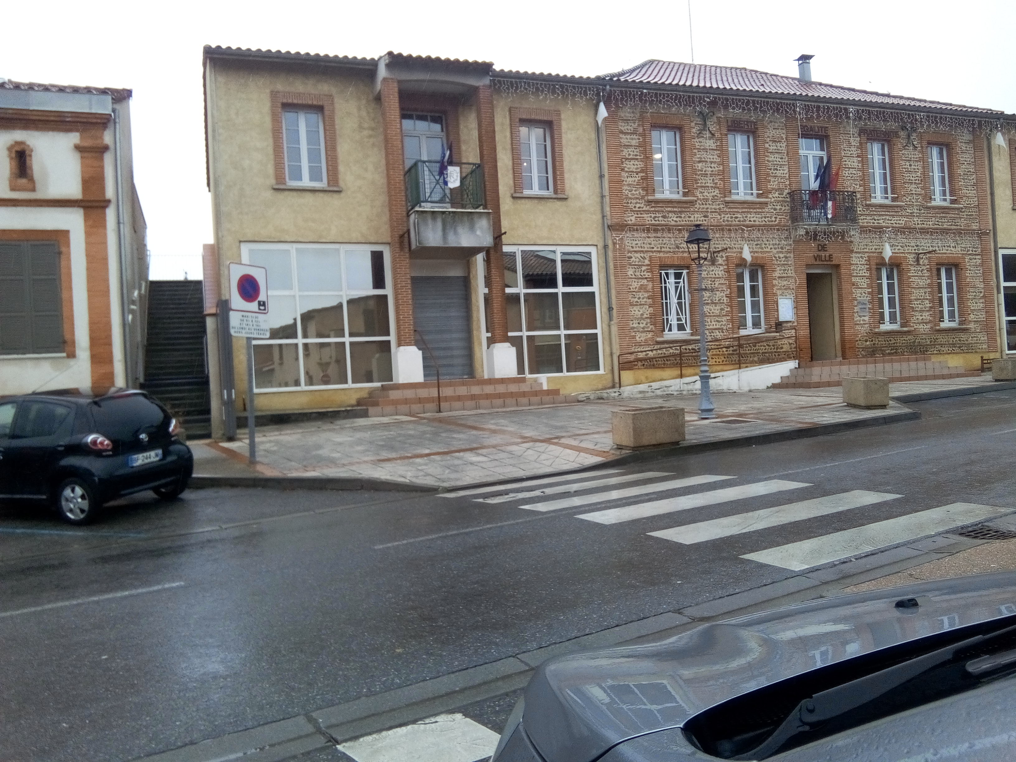 L'hôte de ville de Fonsorbes